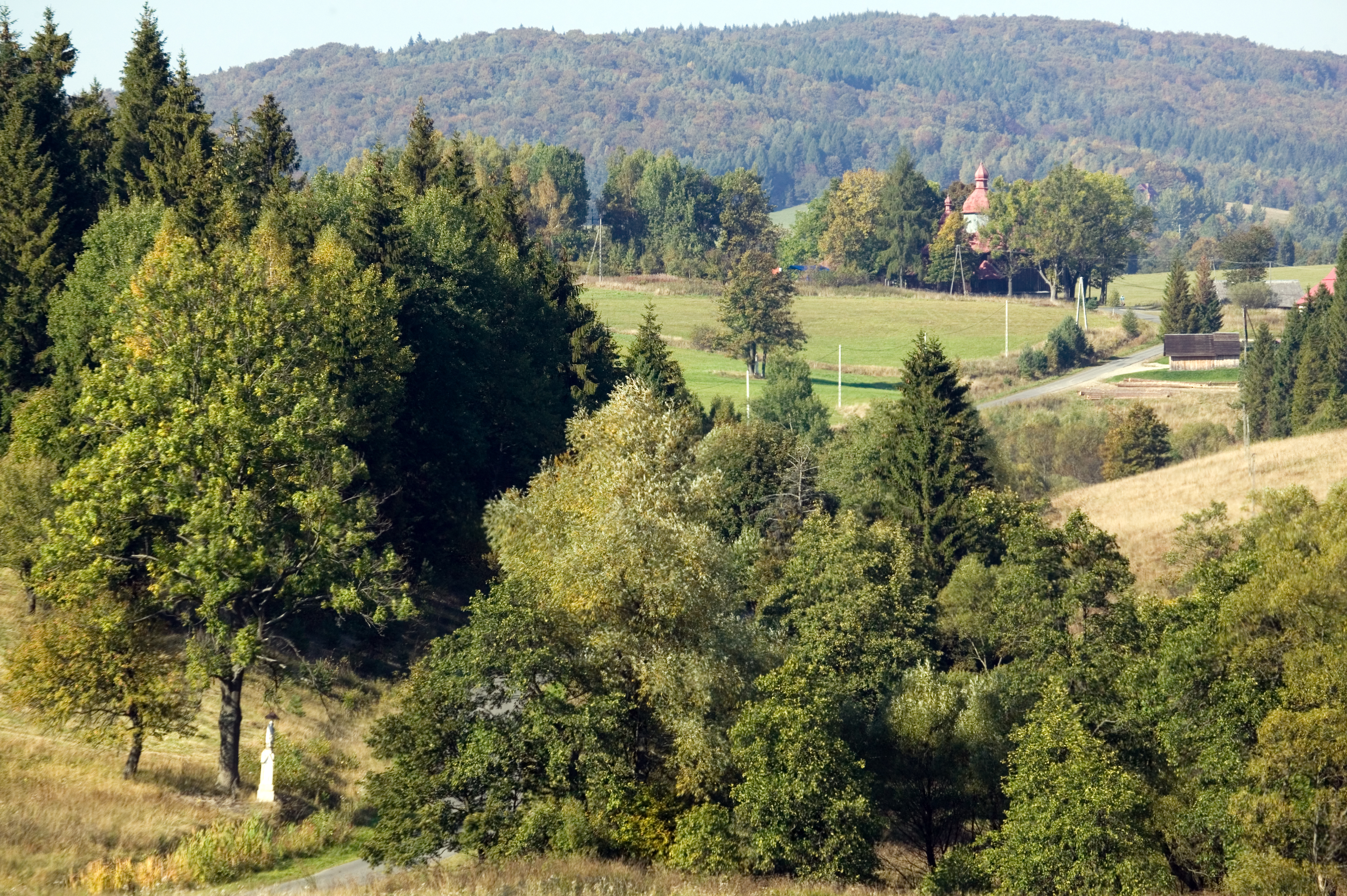 Krzywa